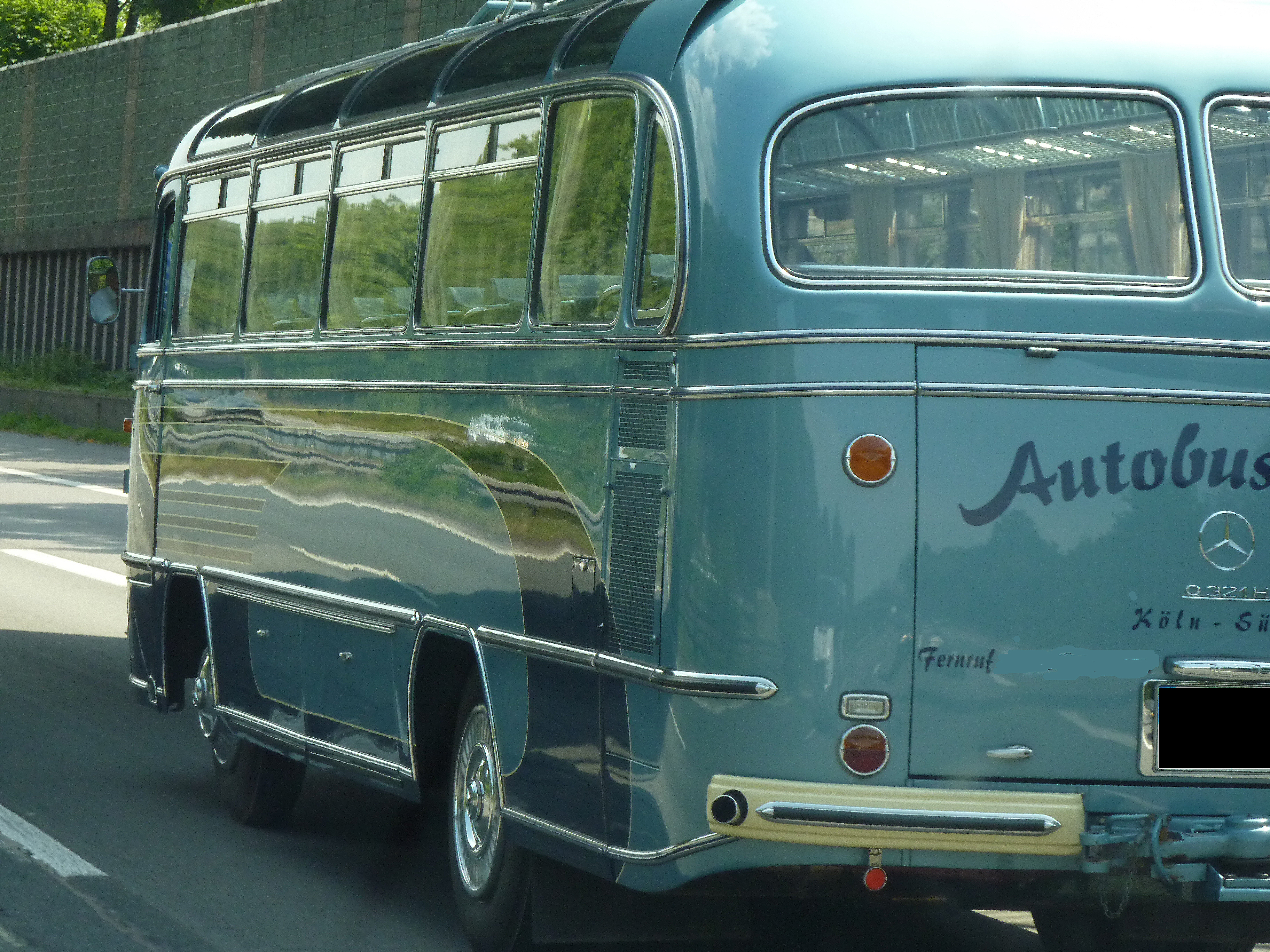 Mercedes Benz Bus (O 321H)